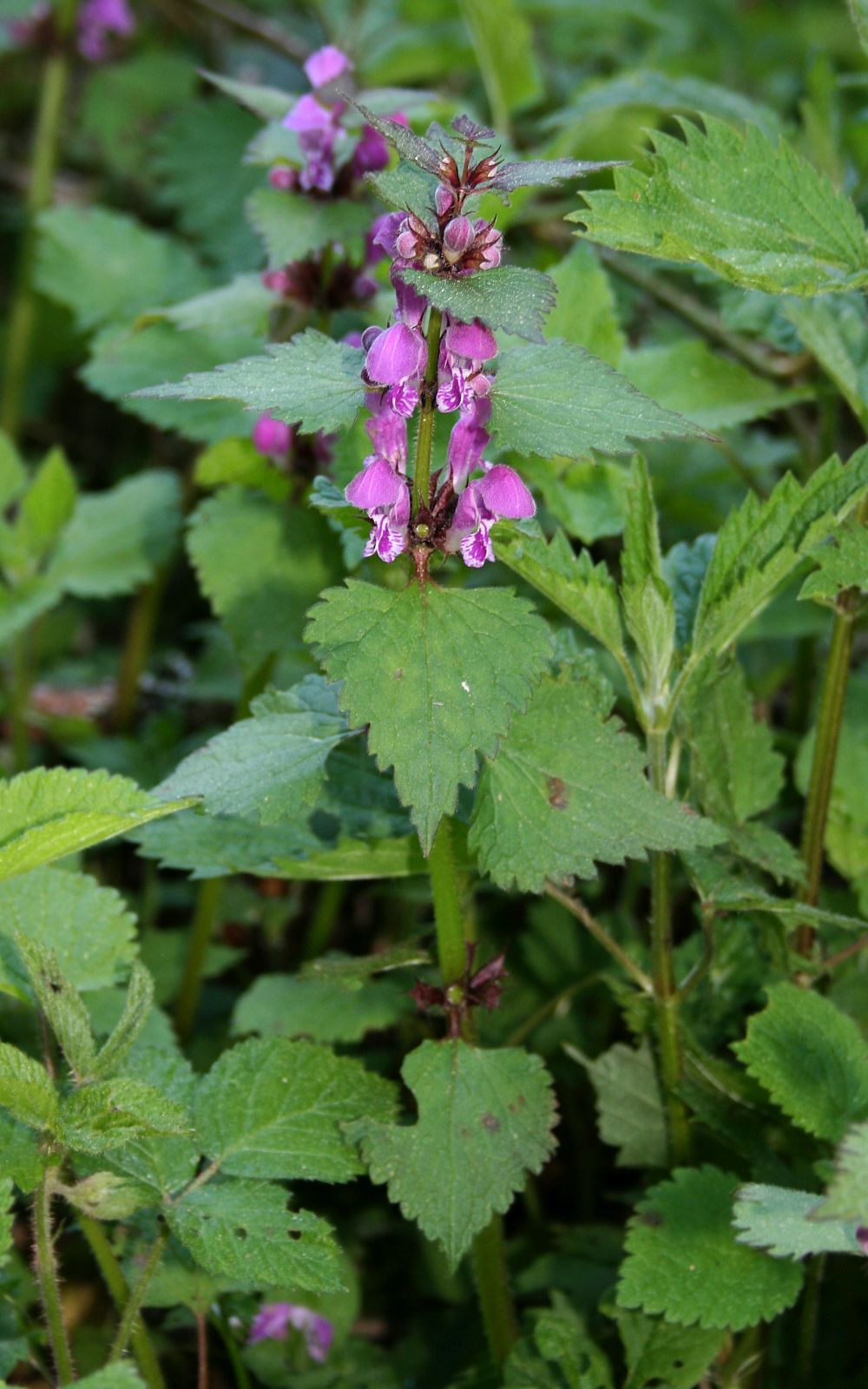 Gefleckte Taubnessel (Lamium maculatum), Lippenblütler (Lamiaceae) – Österreich/Austria/Autriche: Tirol, Kitzbüheler Alpen, Jochbergwald ca. 2,5 km N Pass Thurn, ca. 1060 m